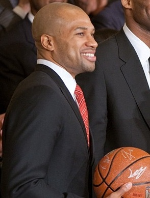 Derek Fisher, pięciokrotny mistrz NBA